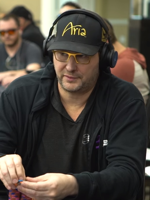 Phil Hellmuth bei der WPT Season XVI LAPC